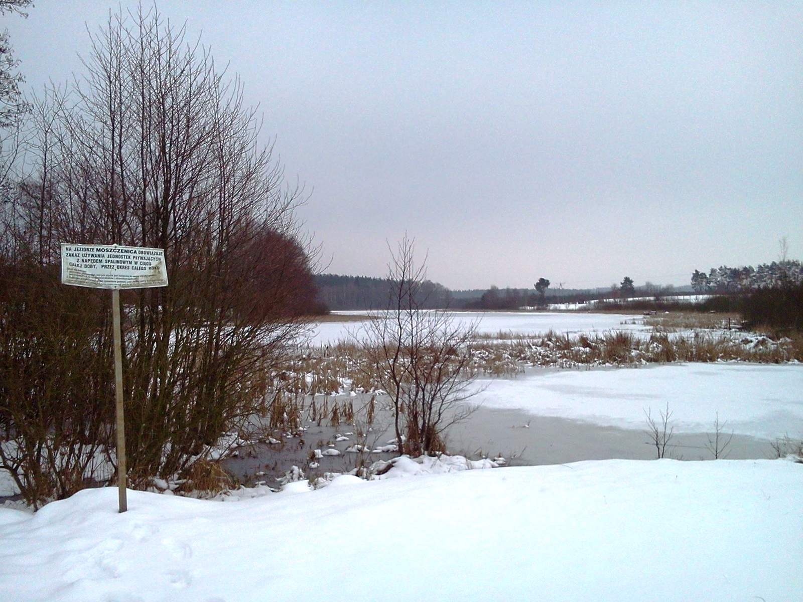 Jezioro